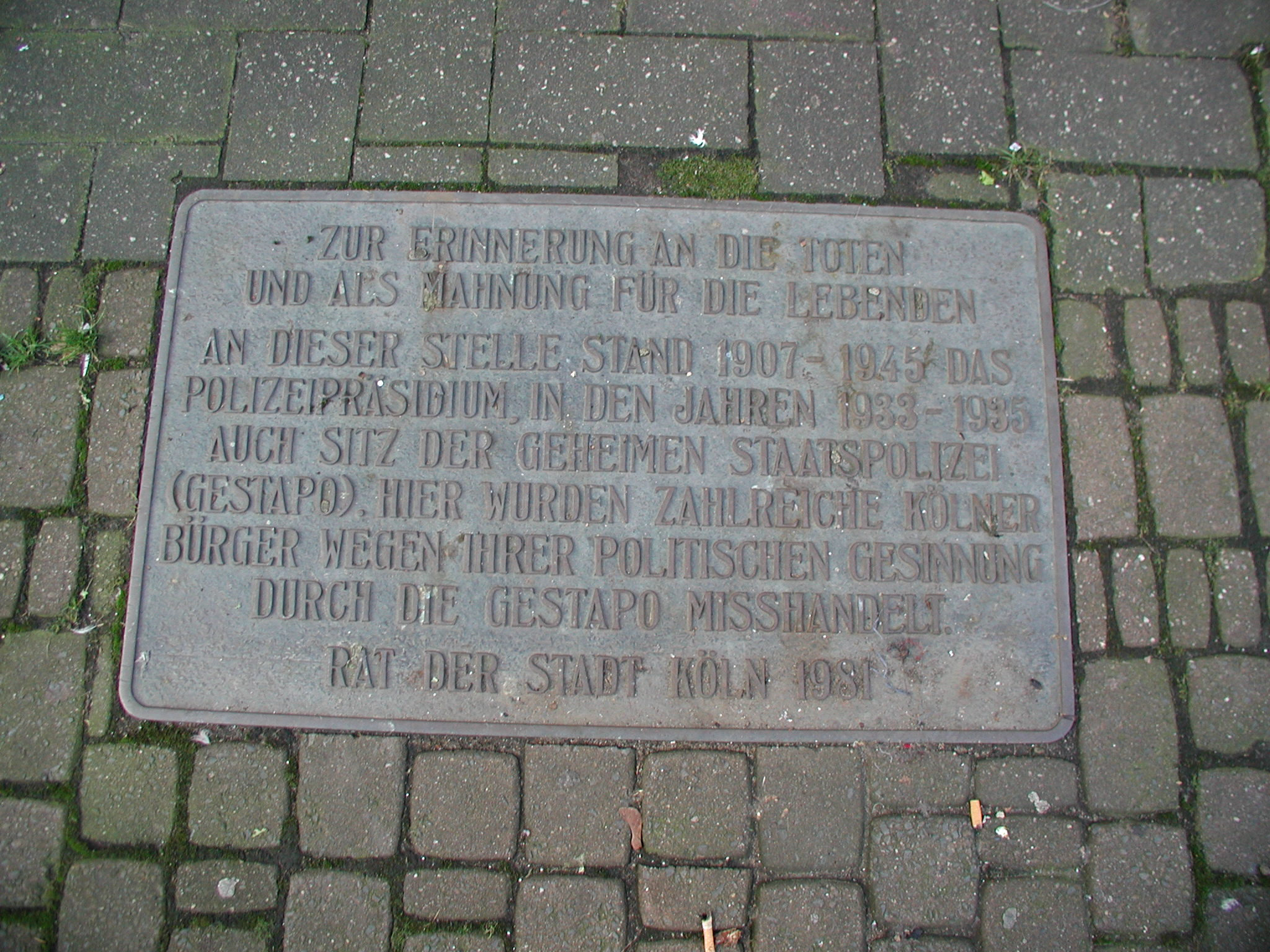 Köln, Gedenktafel des alten Polizeigebäudes Krebs- und Schildergasse